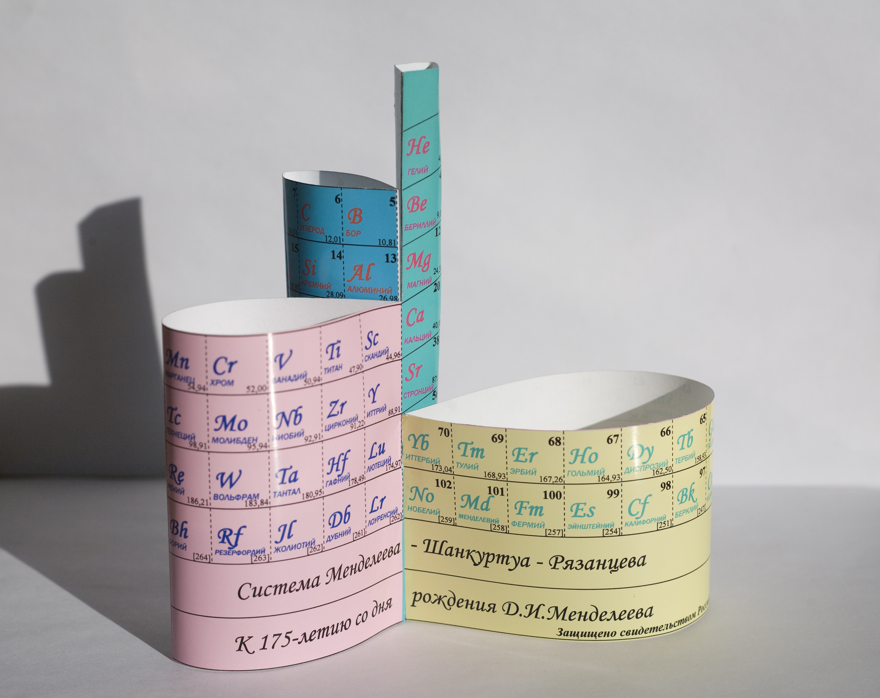 Фотография макета